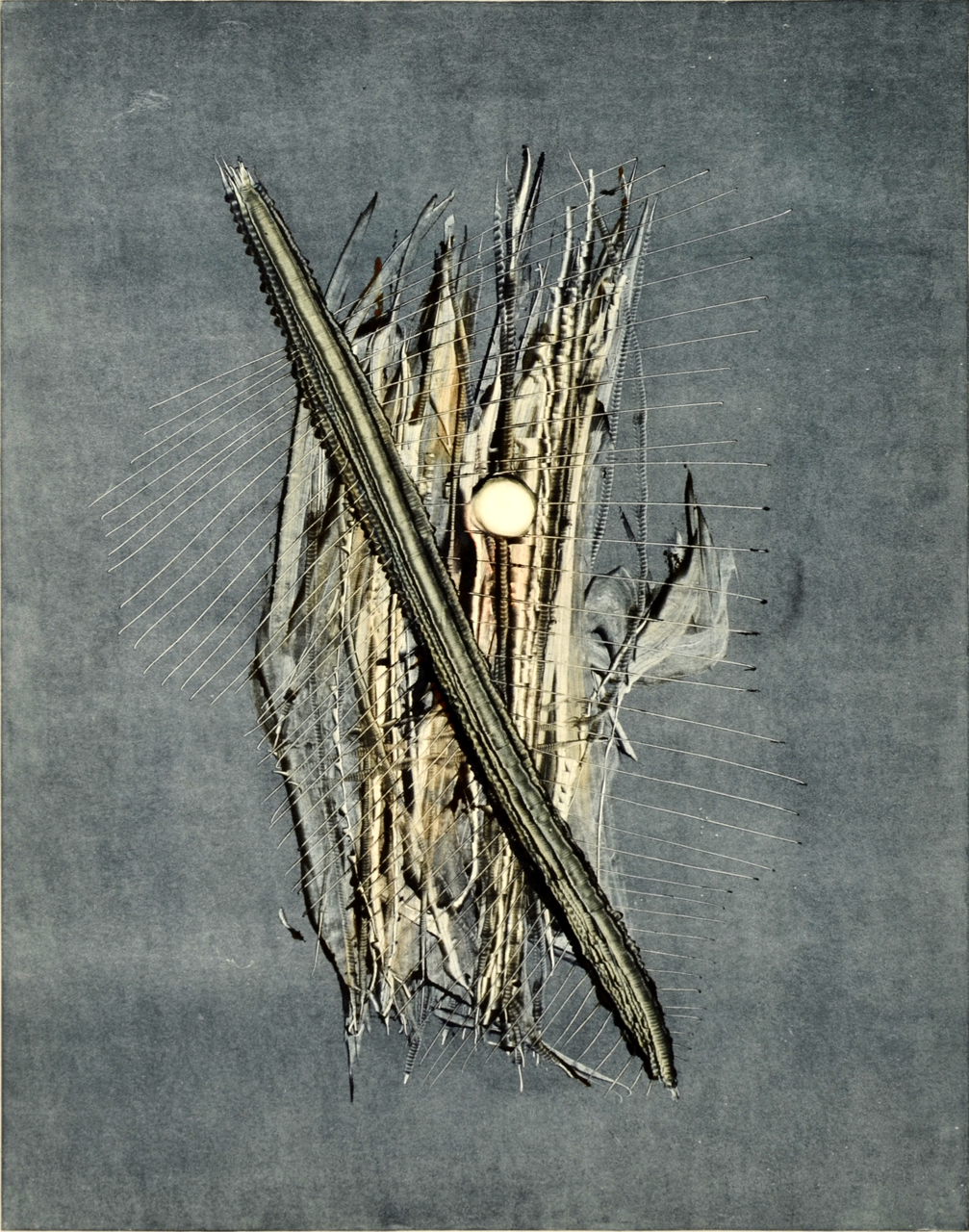 Oldřich Hamera, Bez názvu, monotyp, 44x35 cm, 1971